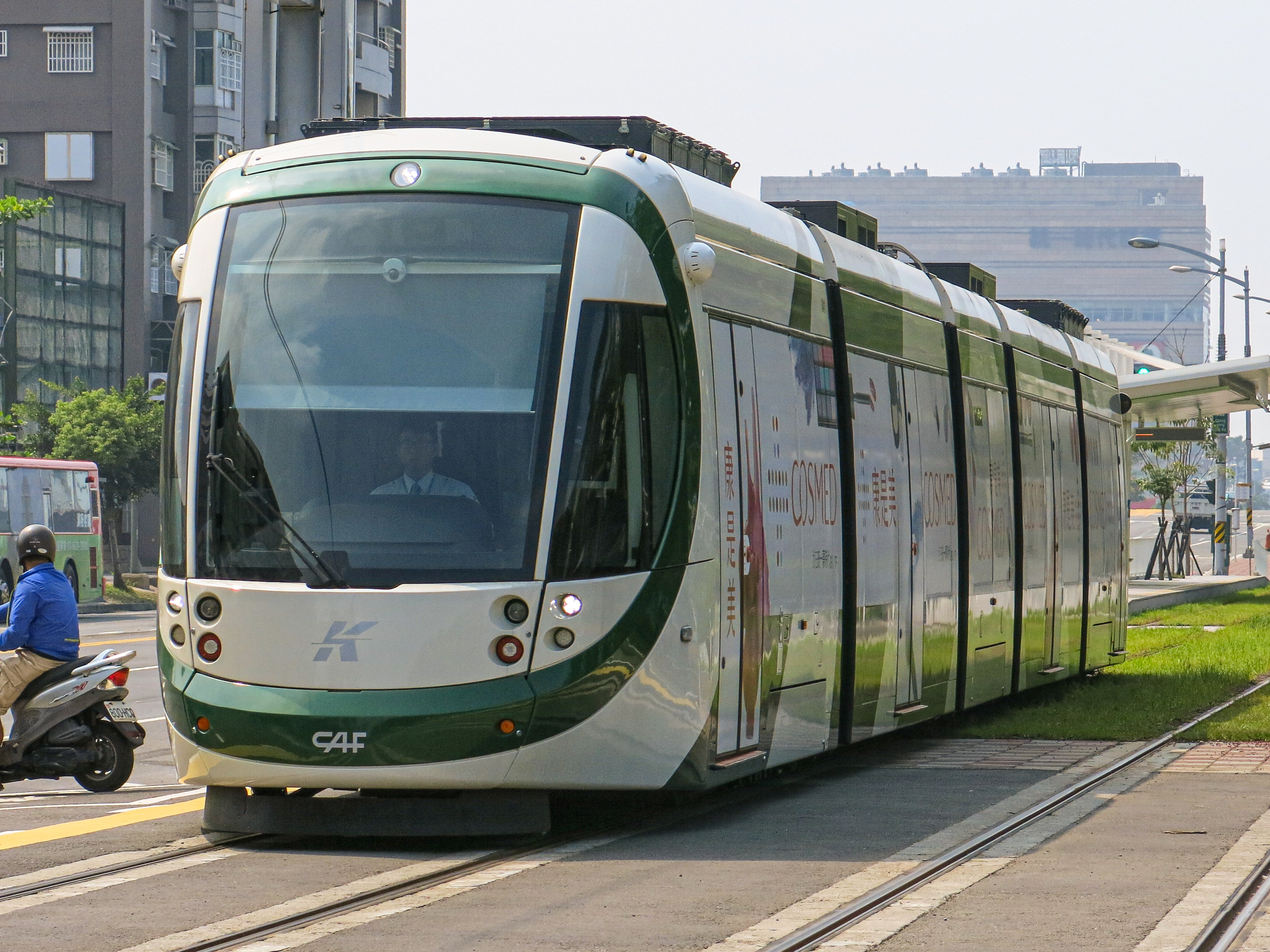 中文（台灣）: 高雄輕軌電聯車